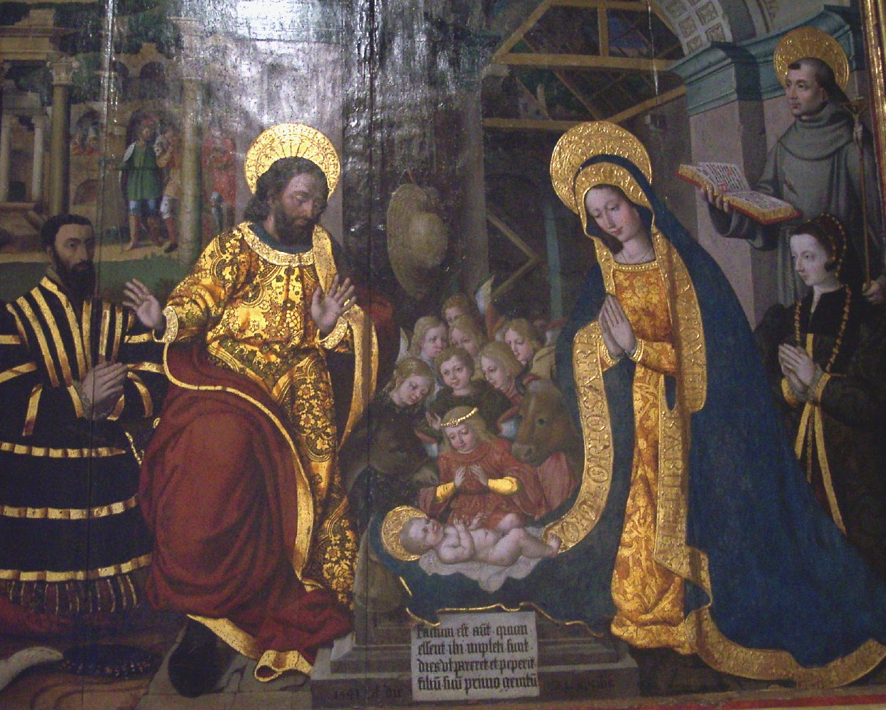 Retable daté de 1541 se trouvant dans la chapelle Sainte-Roseline des Arcs-sur-Argens et pouvant être attribué à l'Ecole de Nice des frères Bréa.